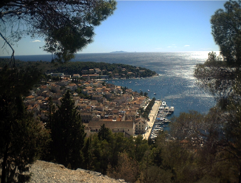 Hvar, Hvar